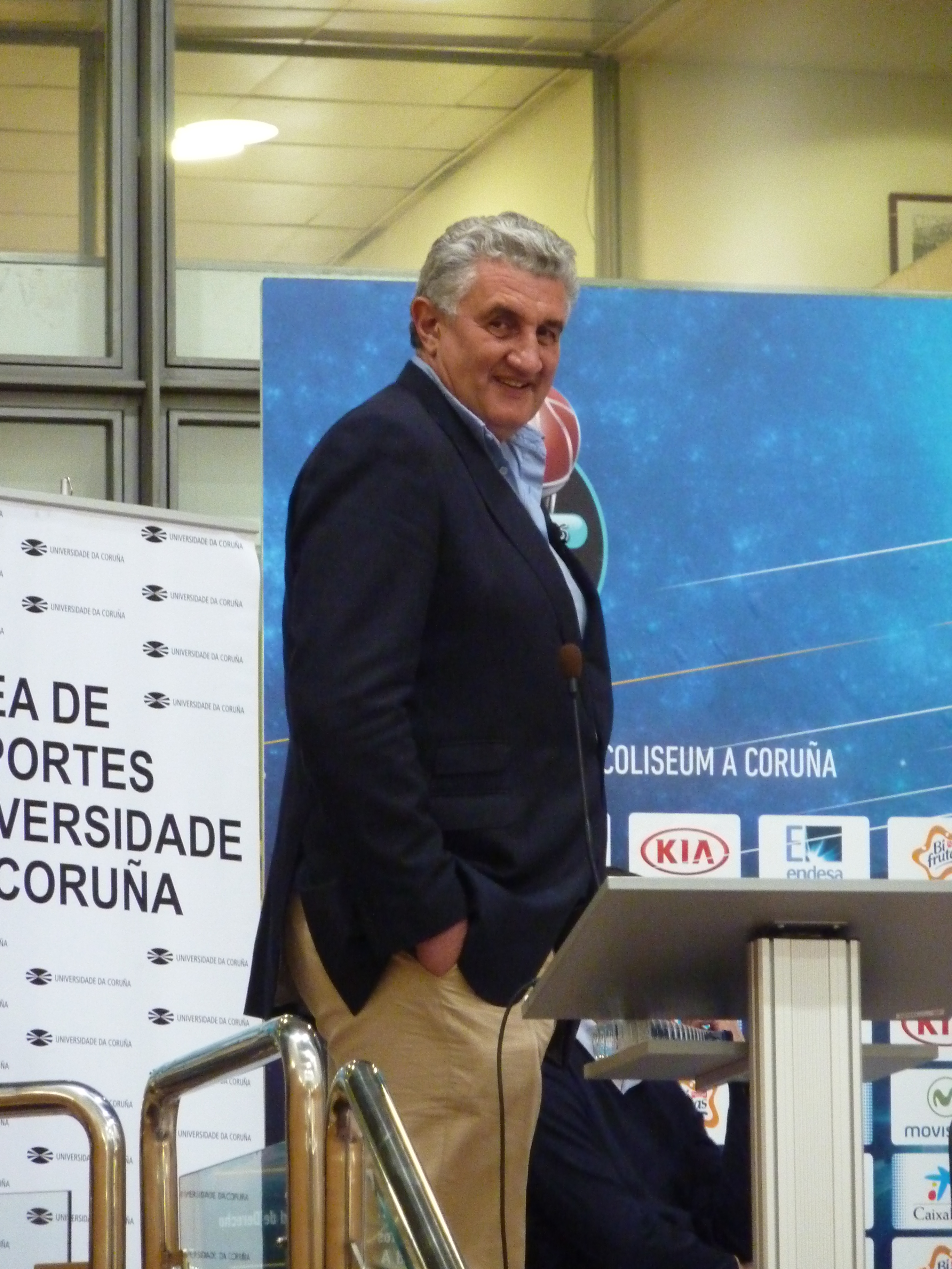 Fernando Romay en facultad de derecho de la UDC durante la promoción de la Copa del Rey de baloncesto.